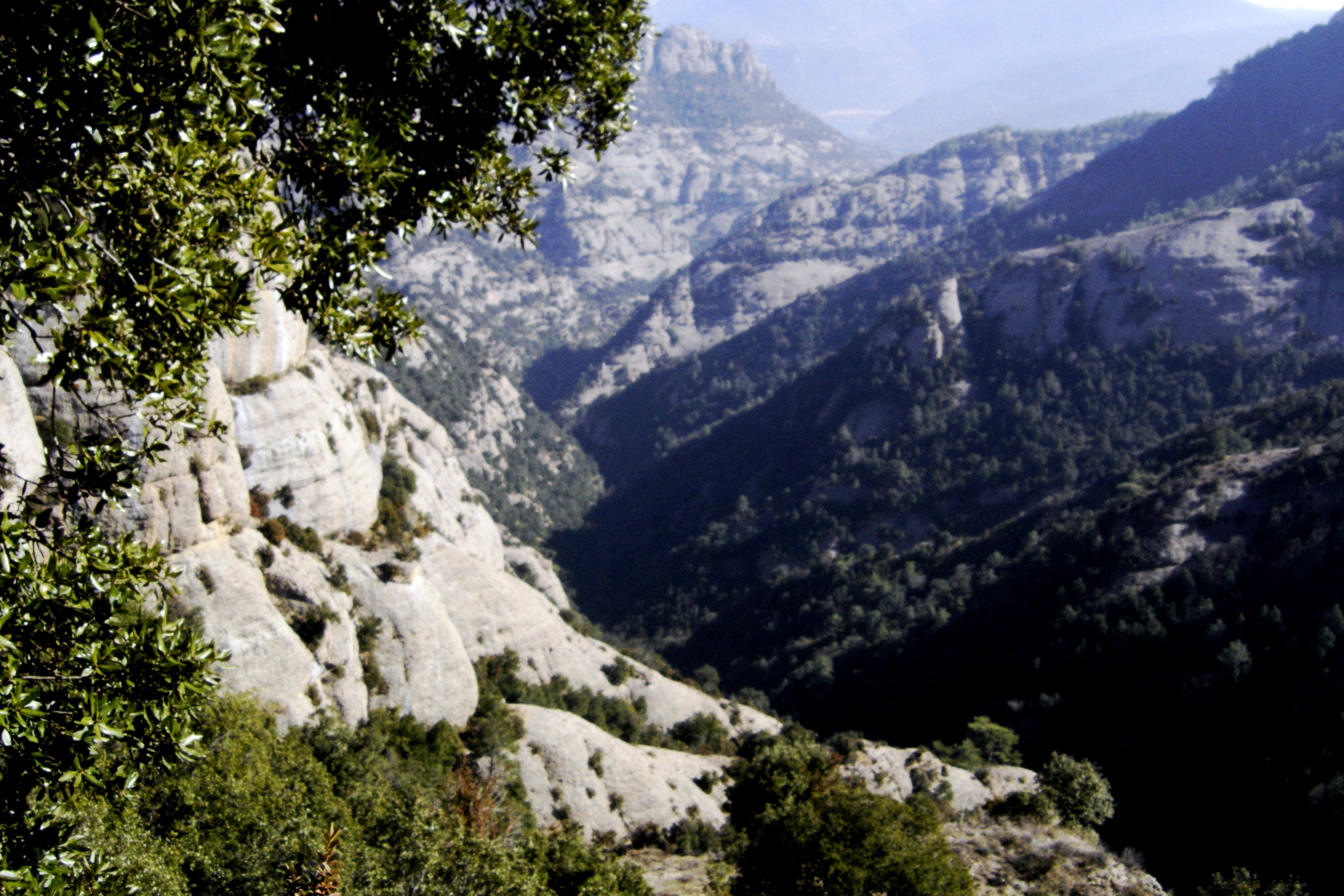 La Rasa de Vilamala (Navès, Solsonès) des del Turó de les Armes. This is a a photo of a natural area in Catalonia, Spain, with id: ES510197